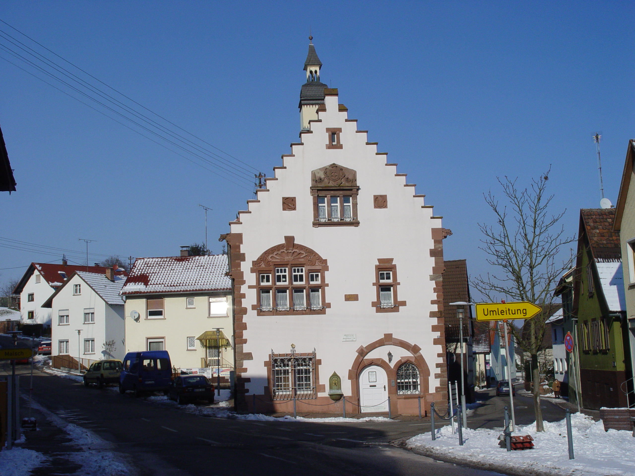 Motiv: Die Ortsverwaltung(Rathaus) von Waldprechsweier im Winter, einem Ortsteil von Malsch bei Karlsruhe. Das Foto wurde von der Talstraße aus fotografiert. Kamera: Sony DSC-F717.